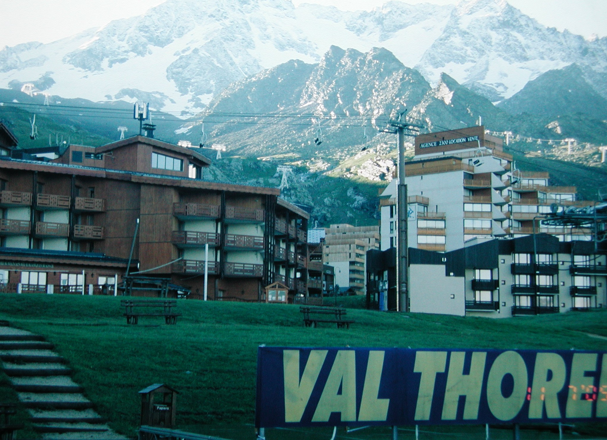 Val Thorens